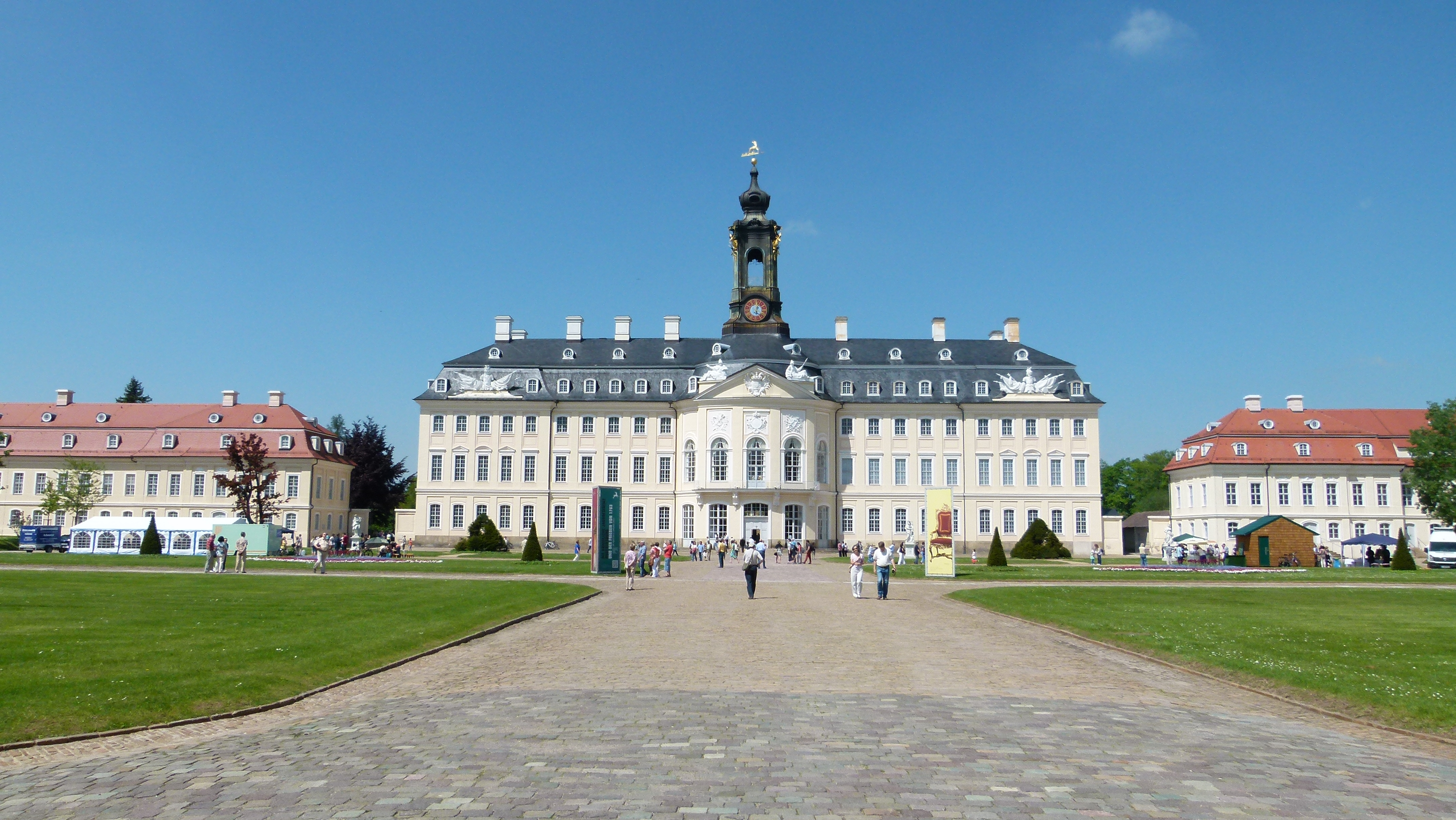 Schloss Hubertusburg, Wermsdorf, Sachsen